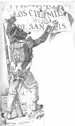 Ilustración de Los cien mil hijos de san Luis de Benito Pérez Galdós. Ilustraciones de Gómez Soler y Esteban, Madrid, Administración de La Guirnalda y Episodios Nacionales, 1881.